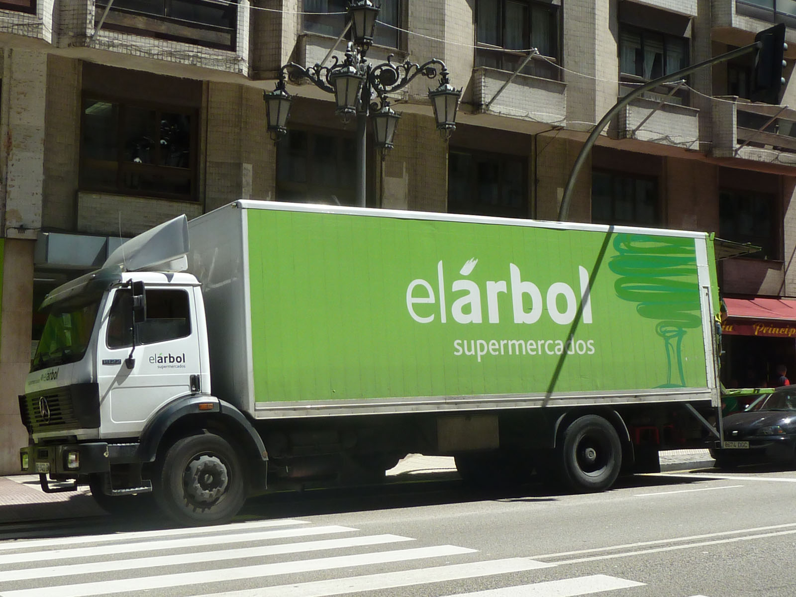 Camión de reparto de El Árbol en Oviedo.